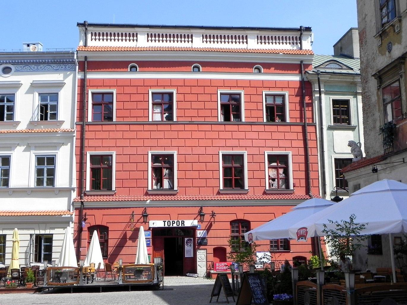 Kamienica Lubomelskich.